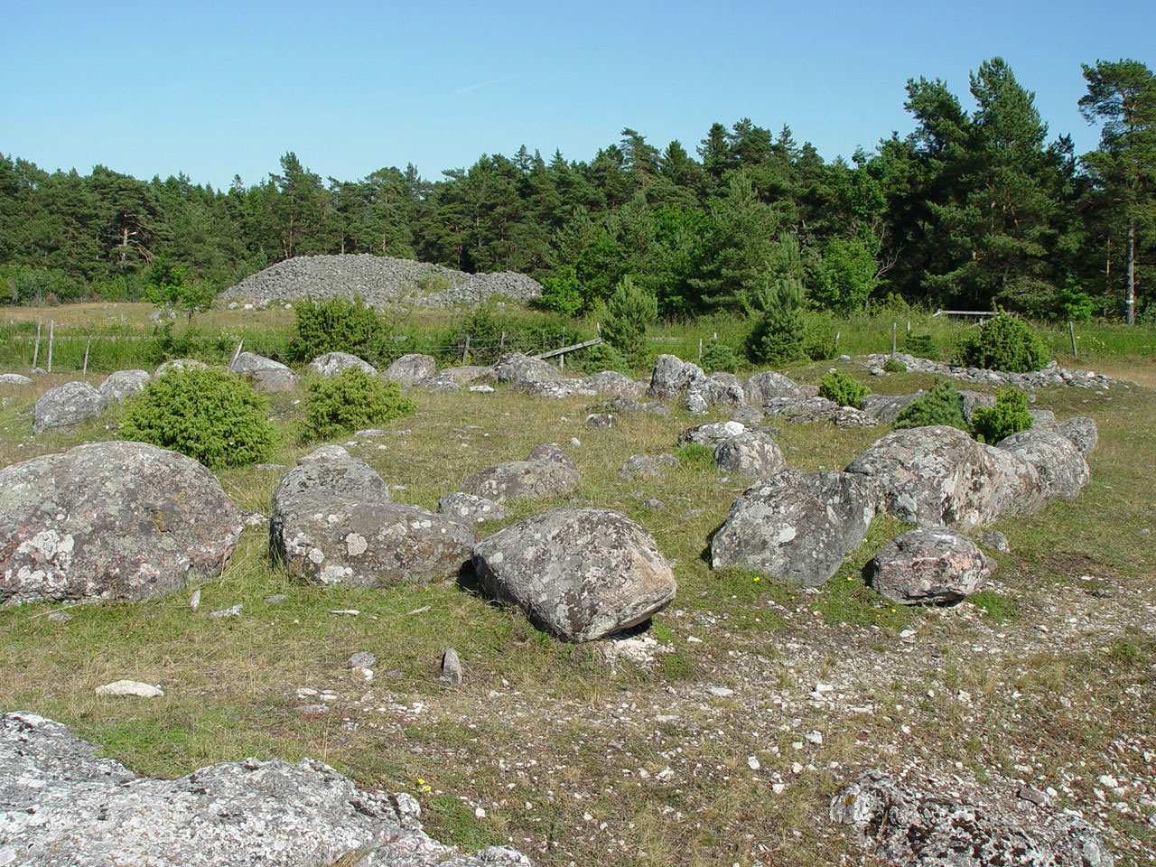 Gotland, Grabstätte Gålrum (über 100 Gräber, Ort:Gemeinde Alskog). Steinsetzung, im Hintergrund Grabhügel "Digerrojr"